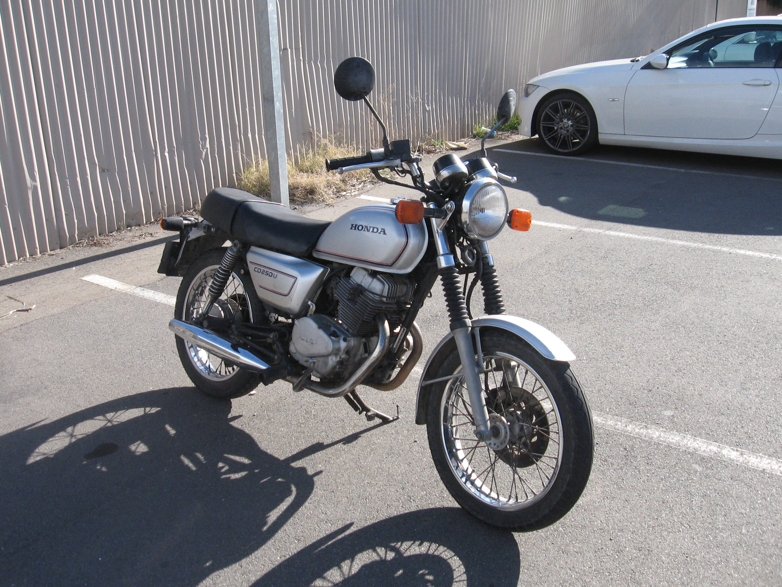 Honda CD 250 U, 1990 model